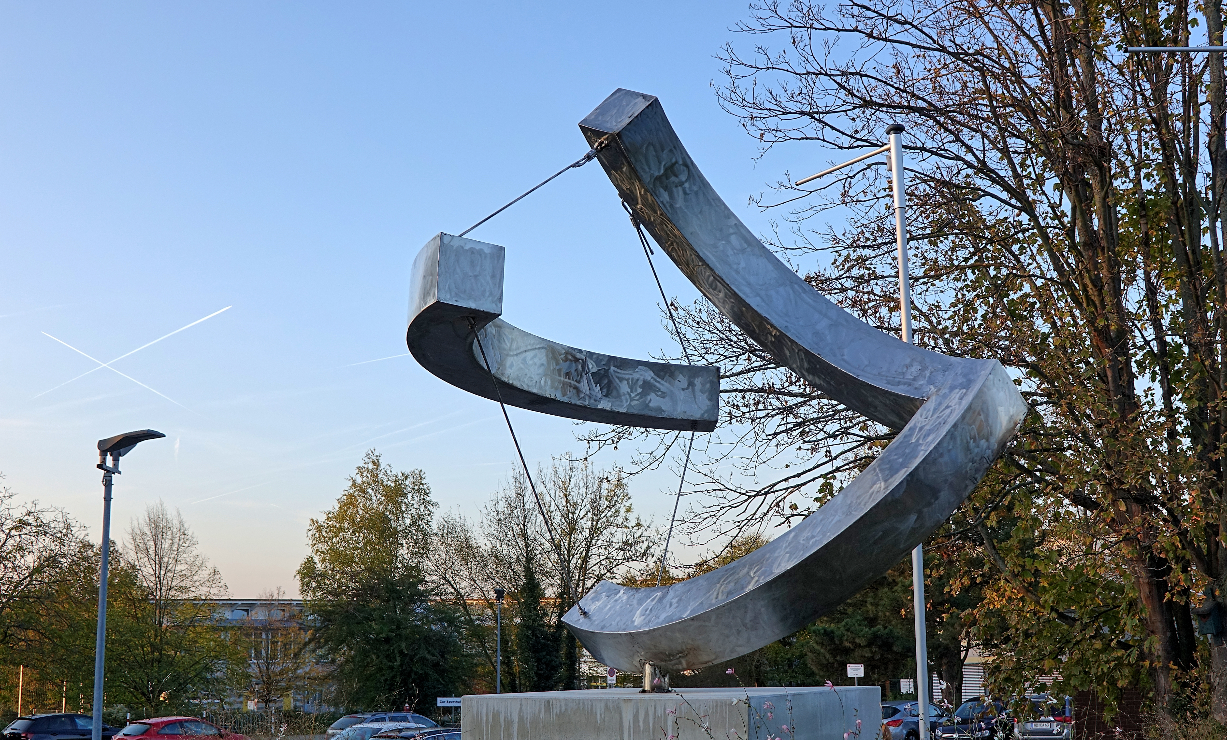 Matthias Will: Große Kreisteilung (2019). Edelstahl, ca. 3.50 m hoch (inkl. Sockel). Auftrag: Landkreis Darmstadt-Dieburg. Standort: Melibokusschule Alsbach-Hähnlein.